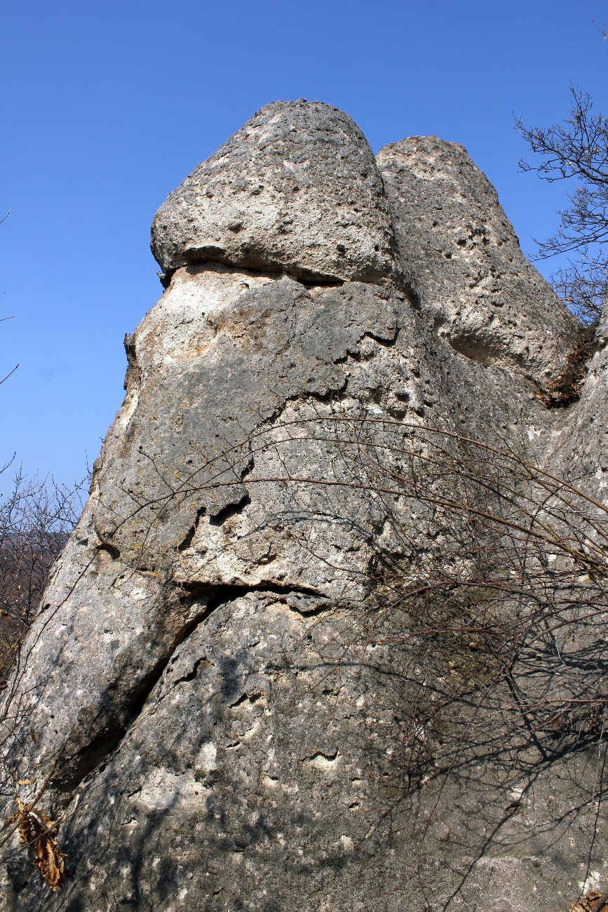 H2a, Eger, Cakó-tető, 2. szikla